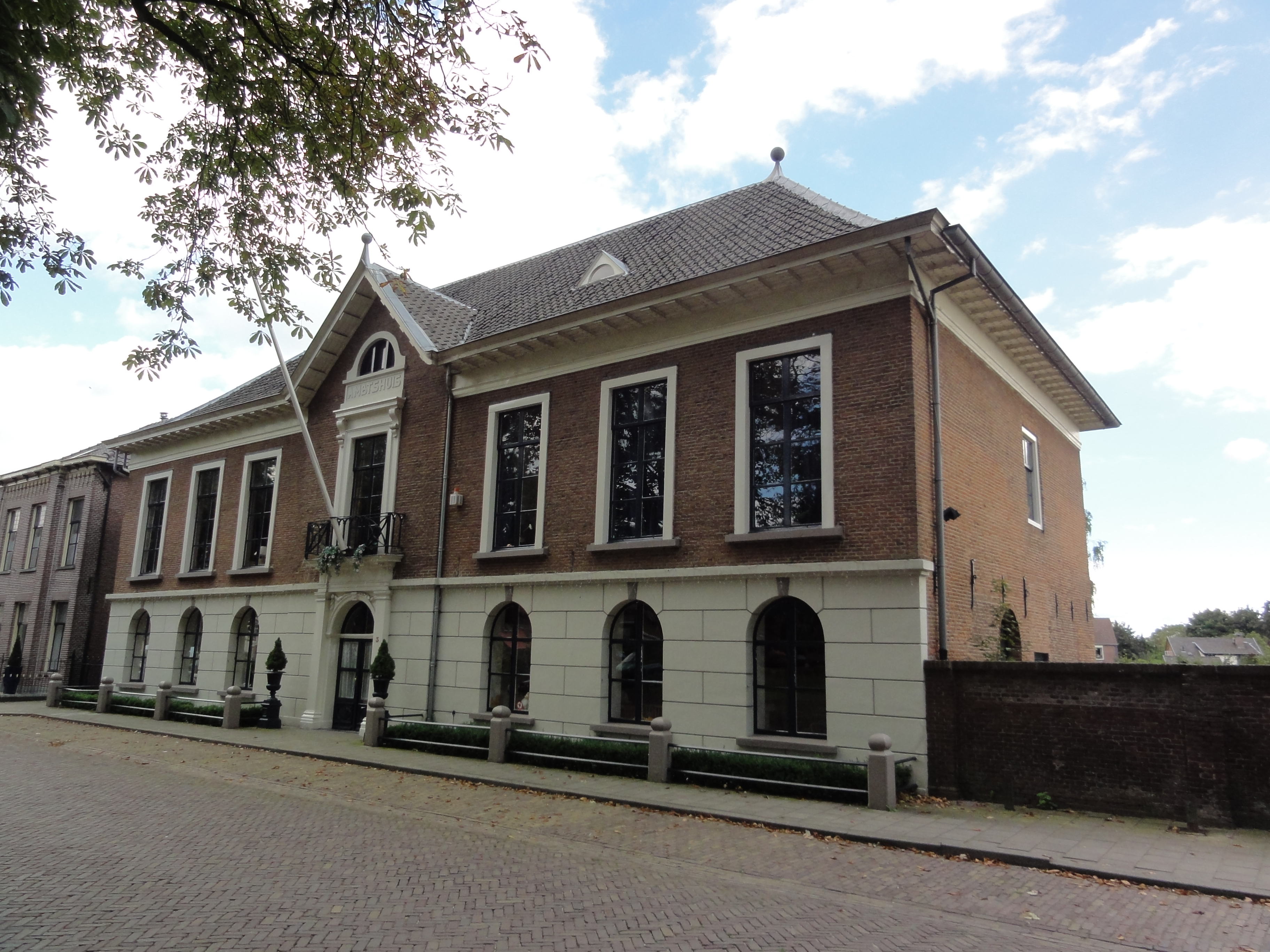 Druten Rijksmonument 14143 Ambtshuis Ambsthuisstraat 3